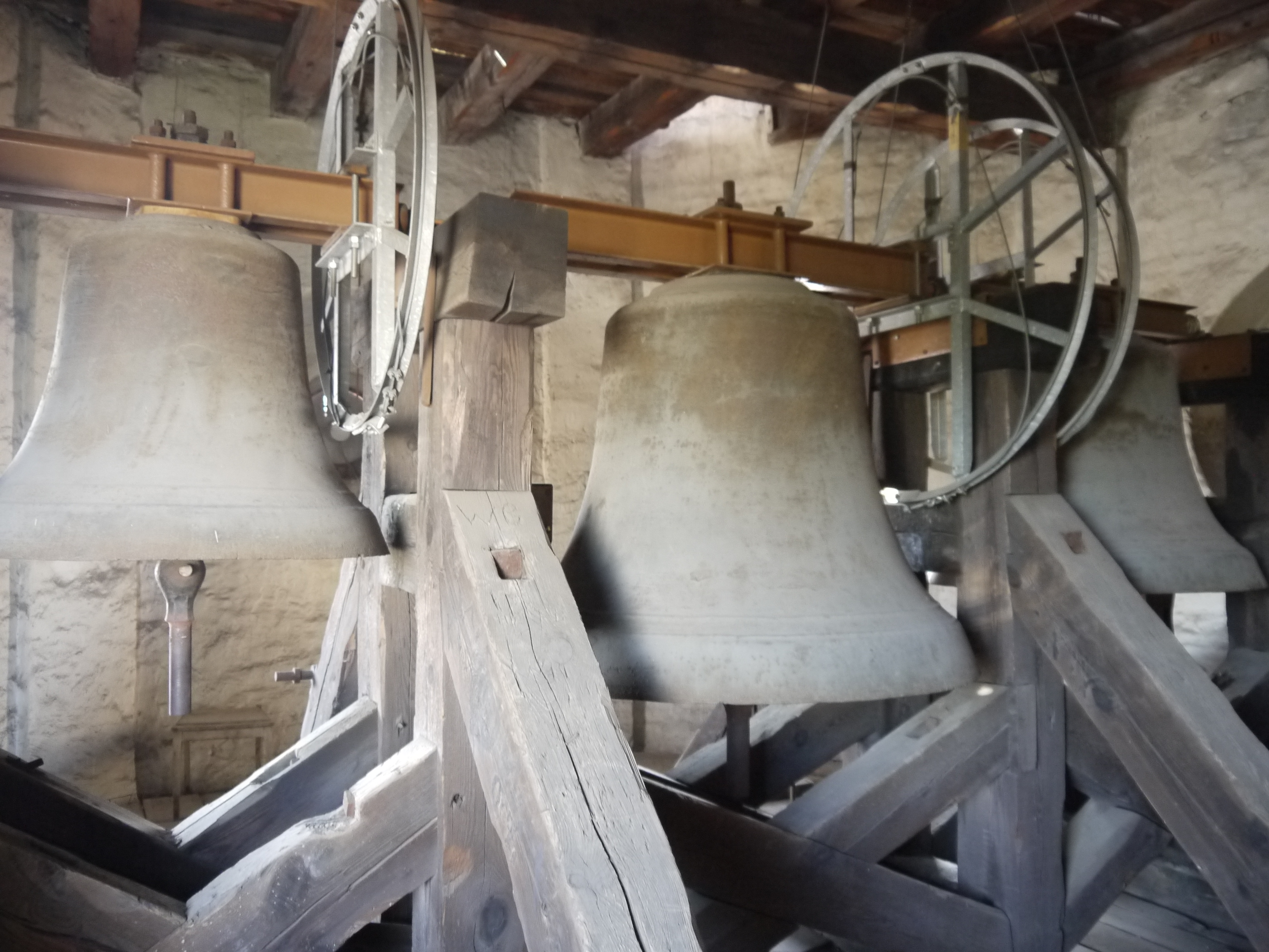 Die Glocken der evangelischen Friedenskirche in Berlin-Niederschönhausen